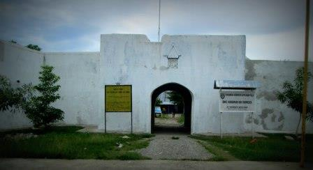 Benteng De Verwachting Benteng bersejarah di Kota Sanana